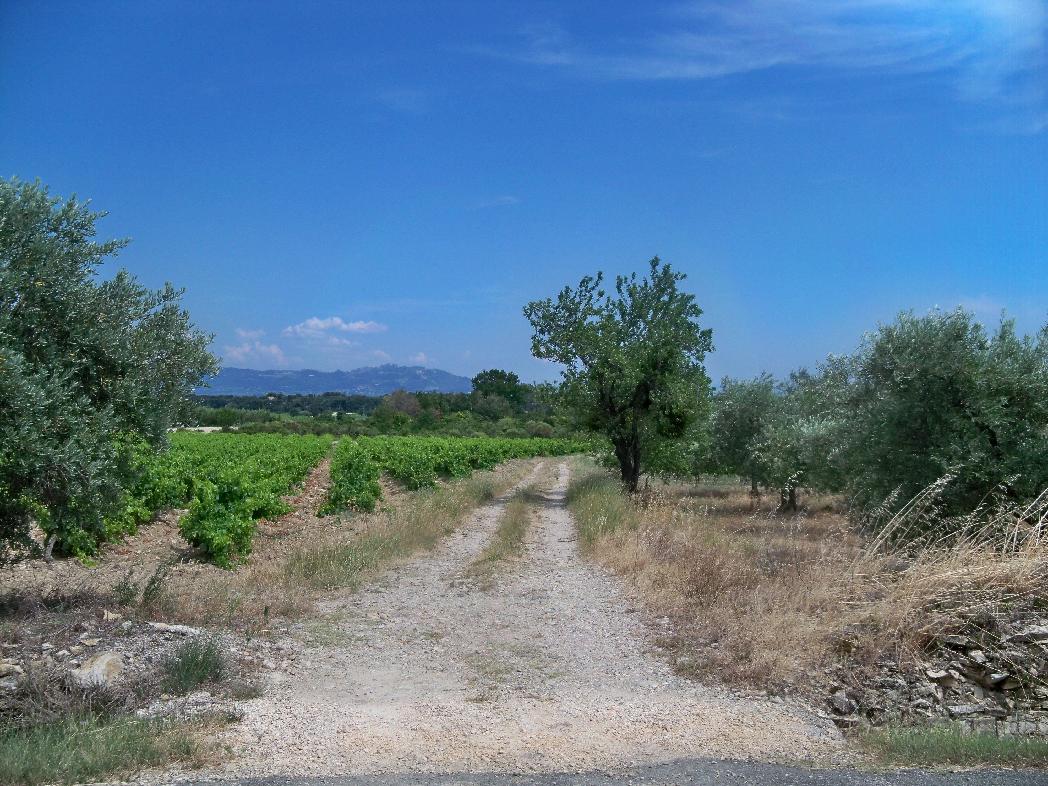 Vignoble et oliveraie dans le Massifs d'Uchaux, Vaucluse